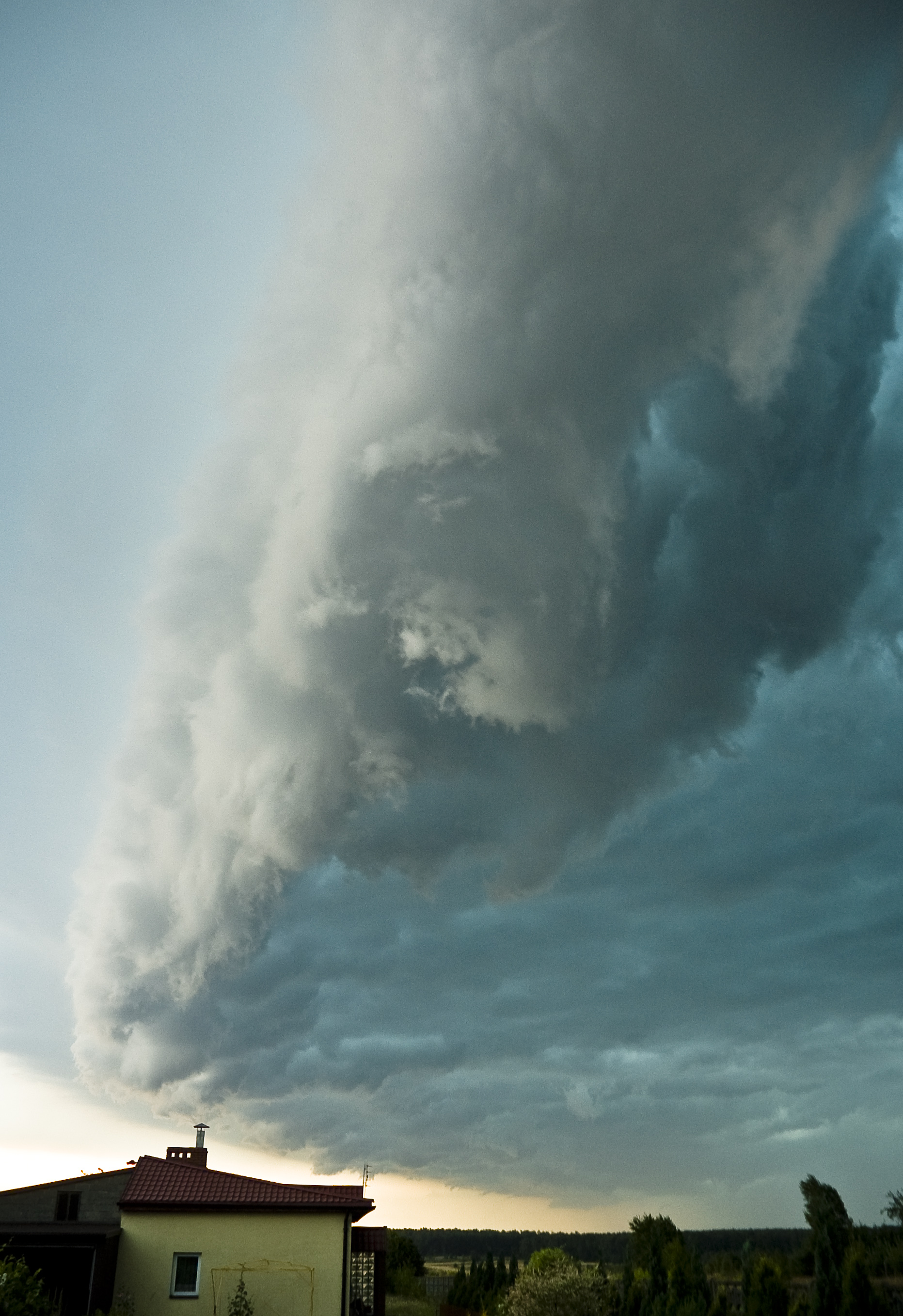 nad częstochową - 2008